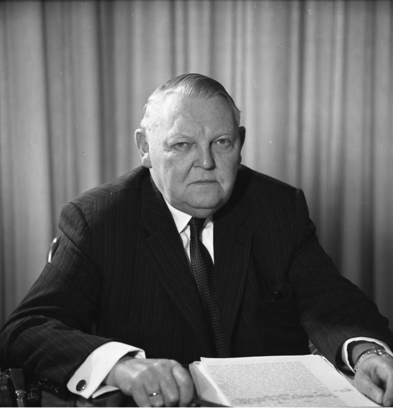 Minister Erhard - Portrait